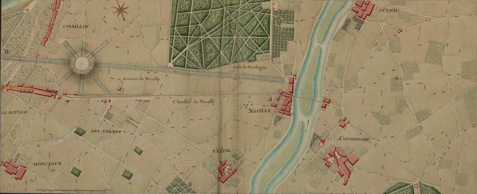 Neuilly et ses environs, seconde moitié du XVIIIème siècle.